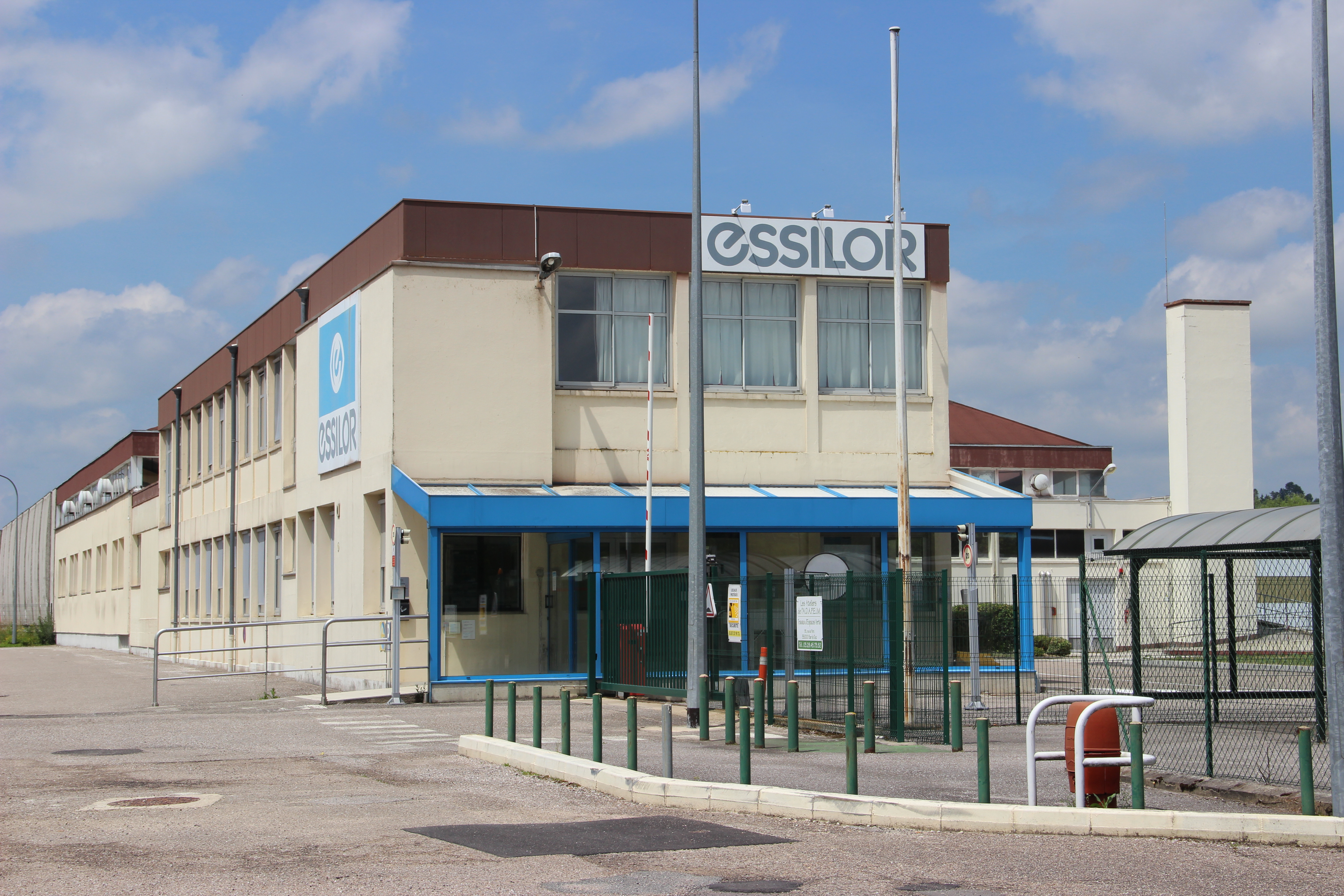 L'Usine Essilor de Ligny-en-Barrois (55) - Site des Battants